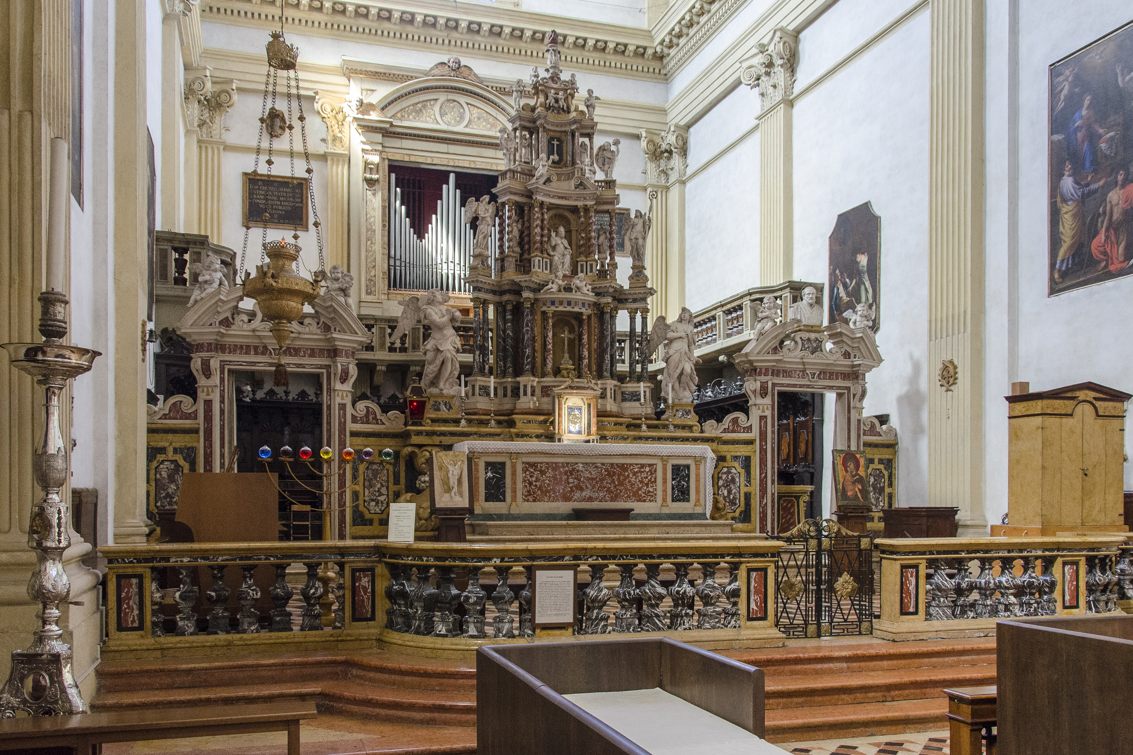 Chiesa di San Nicolò all'Arena, Verona. Altare di Guarino Guarini